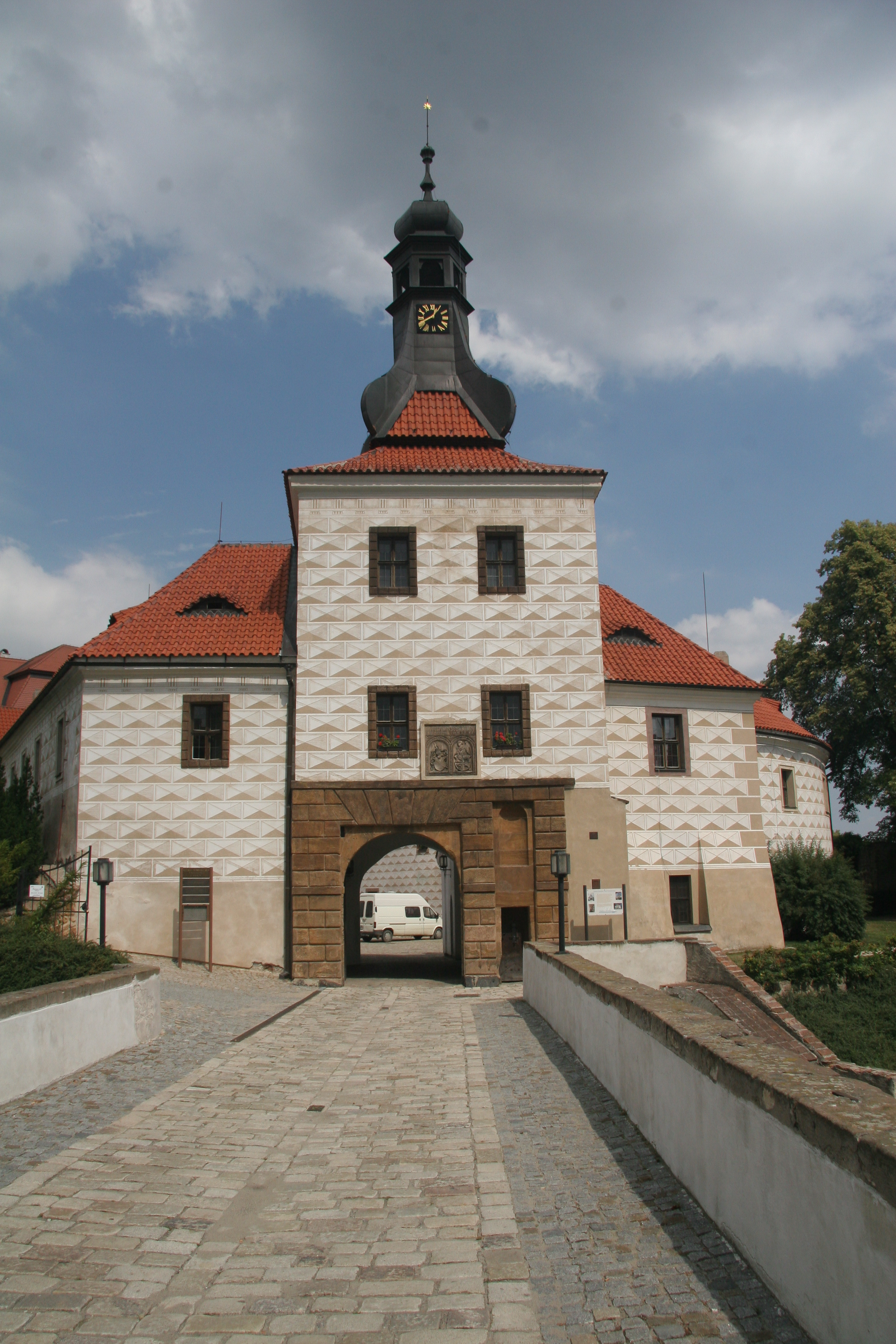 Zámek Kostelec nad Černými lesy, nám. Smiřických 1, Kostelec nad Černými lesy, Kostelec nad Černými lesy.